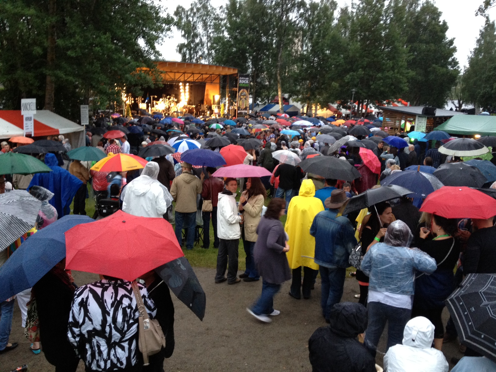 Ilovaarirock 2012